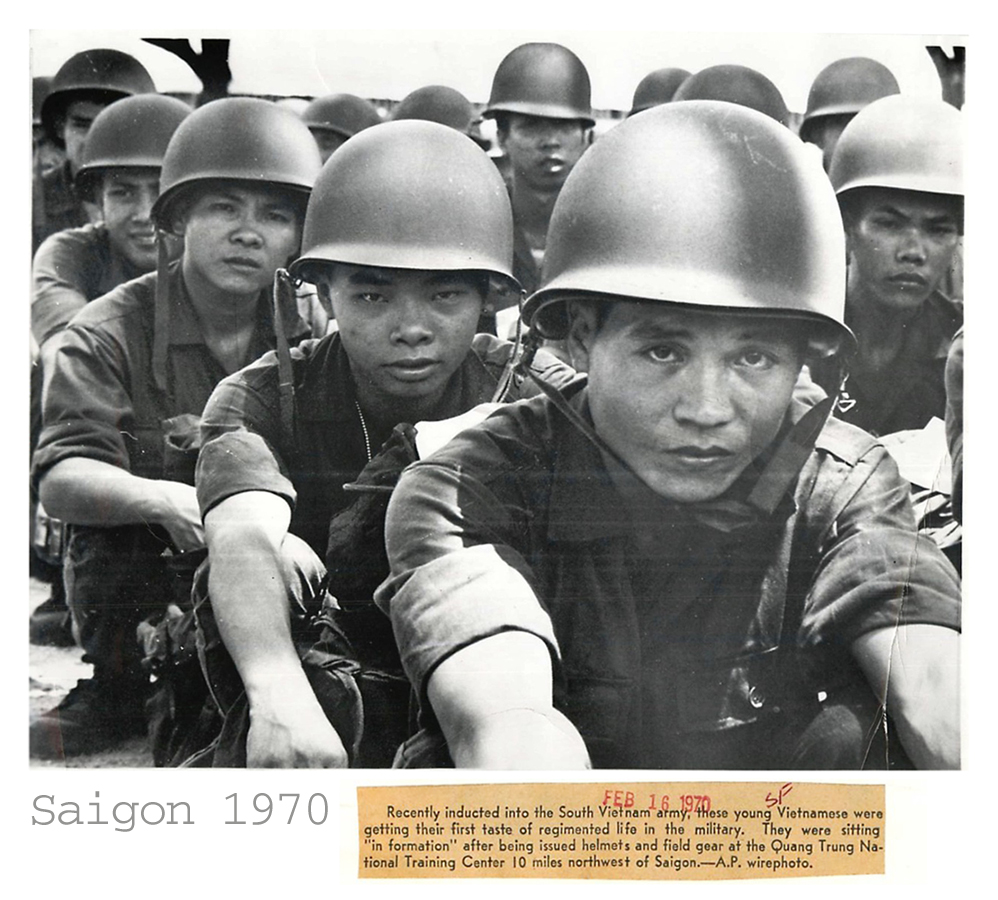 The Vietnamese Troops at Quang Trung National Training Center, Saigon in 1970.